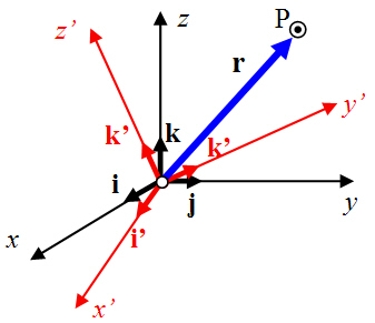 Vector de posición ante la rotación del sistema de coordenadas.